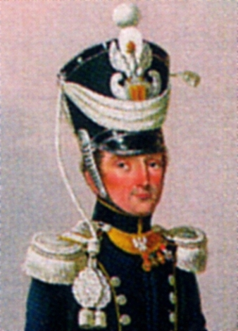 Polish general Piotr Szembek (1788-1866)